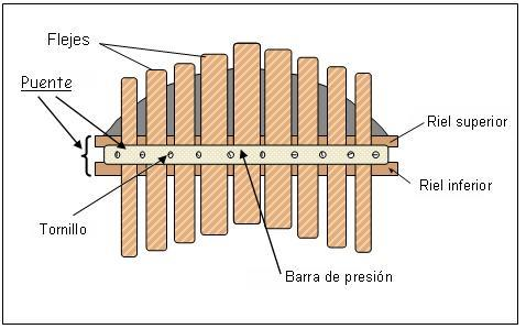 Teclado con sus partes constitutivas.